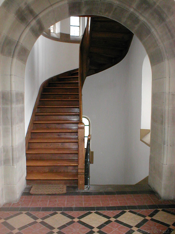 Blick in den linken Treppenturm der evang. Matthäuskirche in Heilbronn-Sontheim, Baden-Württemberg, Deutschland